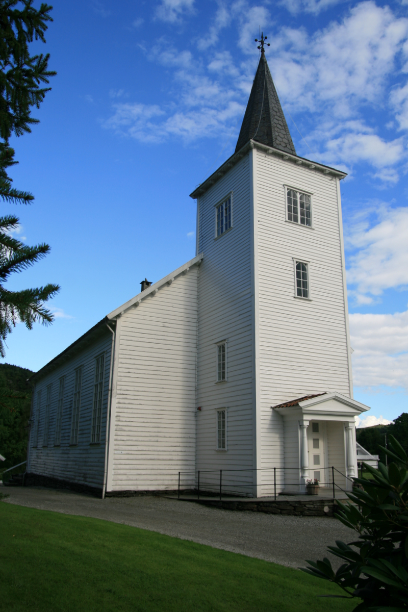 Nedstrand kirke